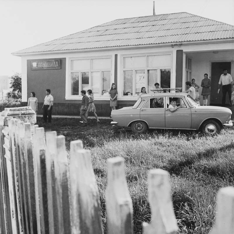 Hancesti district, Moldova.